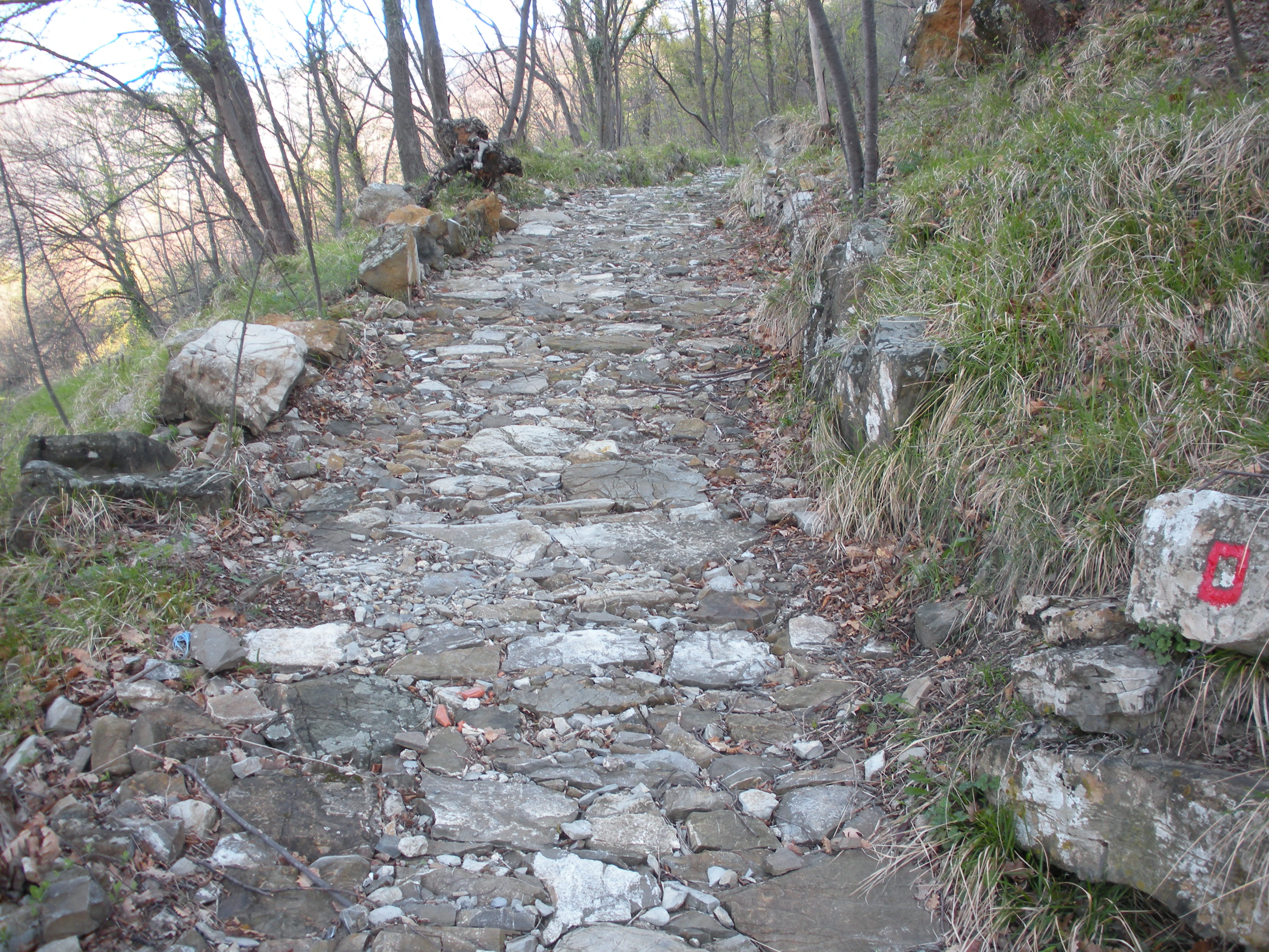 Molassana (quartiere di Genova), l'antica mulattiera per Creto